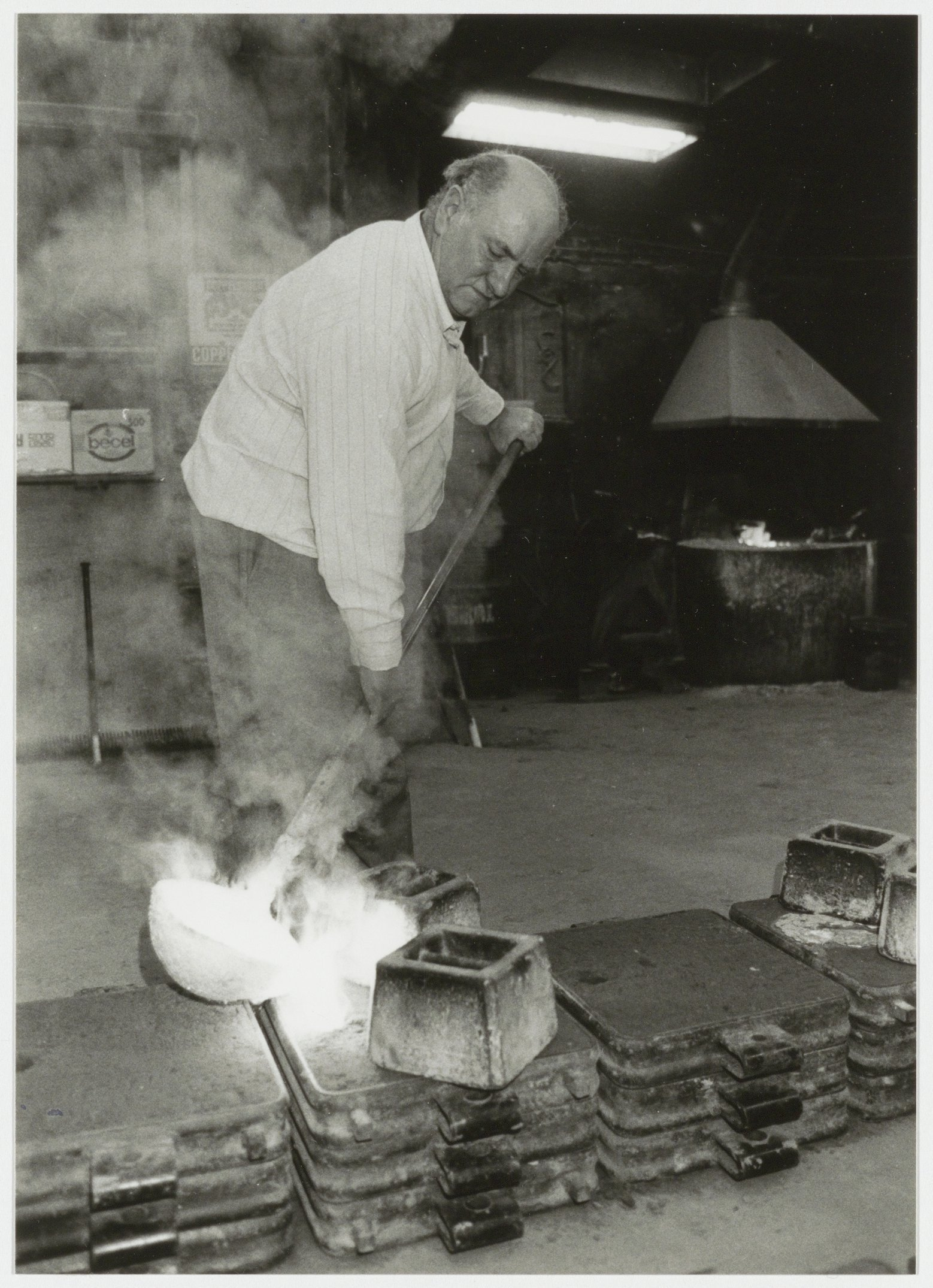 CollectieCollectie Fotoburo de BoerInventarisnummerNL-HlmNHA_54035338NL-HlmNHA_1478_40161kBeschrijvingDemonstratie van kopergieten in Oudhollandse Kopergieterij Brink & van Keulen aan de Koudenhorn 66-70 door Pieter van Loevezijn tijdens Open Monumentendag.FotonummerNL-HlmNHA_1478_2422DocumenttypeHistorieprenten, tekeningen en foto'sVervaardigerBoer, Poppe de Soort vervaardigerFotograaf AnnotatiesHD 060994PersonenLoevezijn, Pieter van LandNederland ProvincieNoord-Holland GemeenteHaarlem PlaatsHaarlem StraatKoudenhorn Begindatum09-1994Einddatum09-1994TechniekFoto Trefwoordenberoepen en ambachten